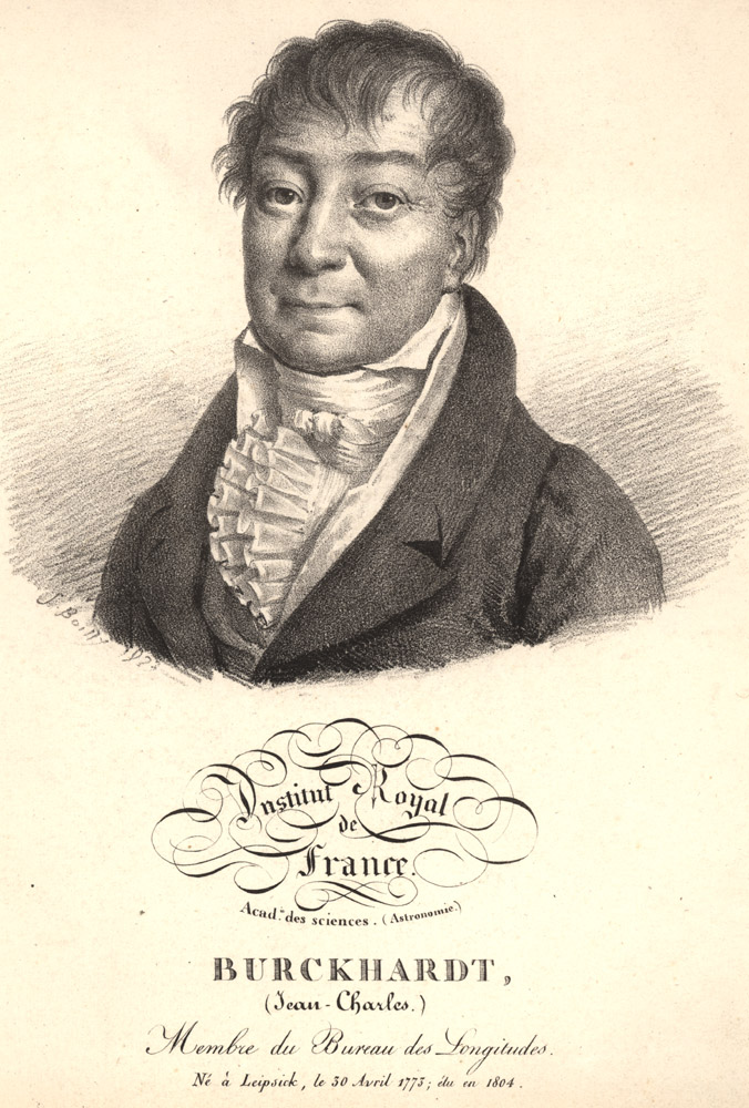 Der deutsche Astronom Johann Karl Burckhardt / Jean Charles Burckhardt (1773-1825)